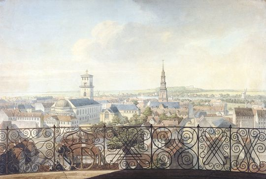 Akvarel af H. G. F. Holm: Udsigt fra Rundetårn til Vesterbro. I midten Frue Kirke og Universitetet. I baggrunden Frederiksberg slot.